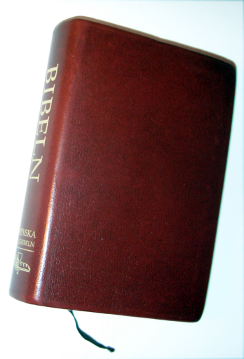 Bilden föreställer Svenska Folkbibeln